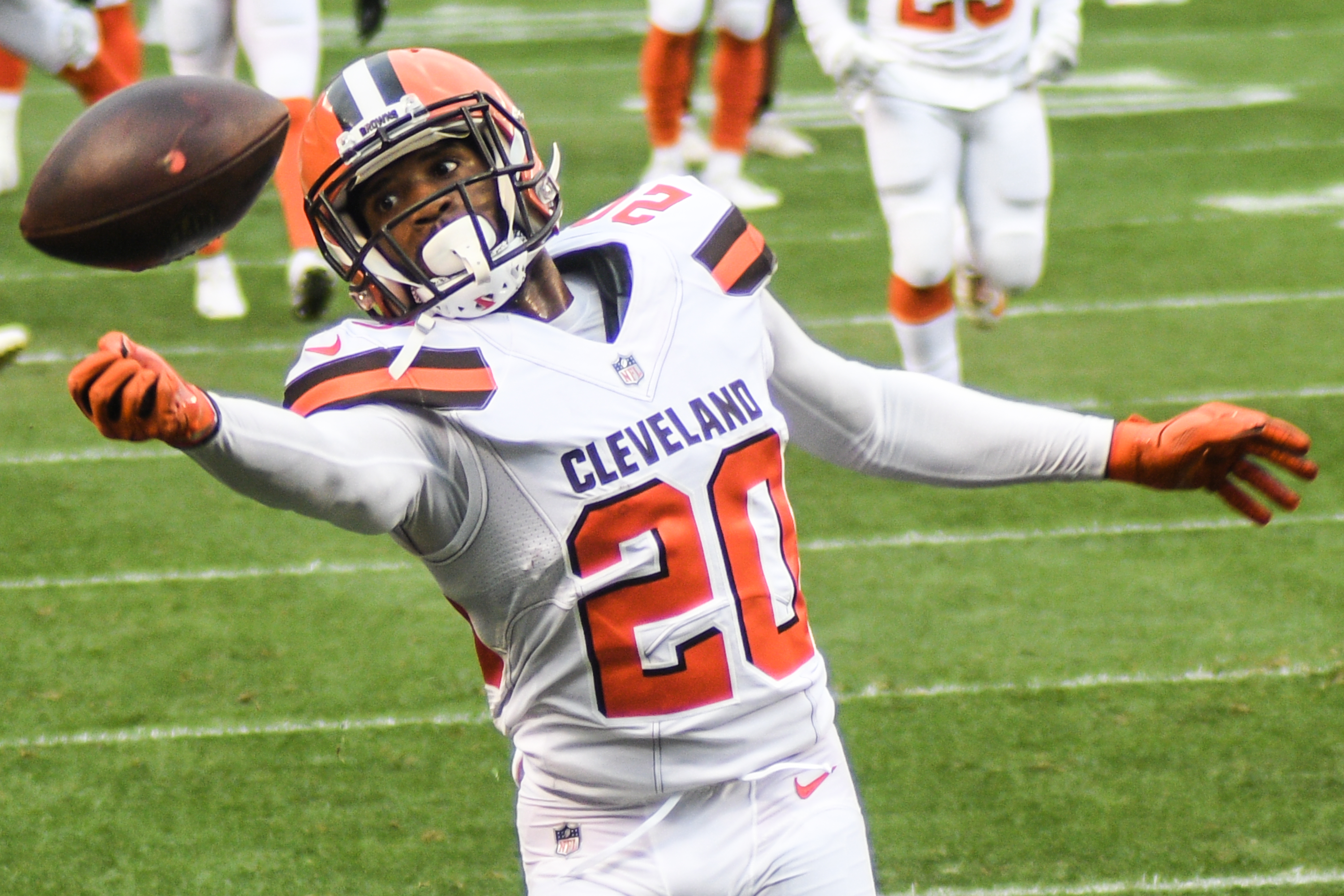 Brian Boddy-Calhoun